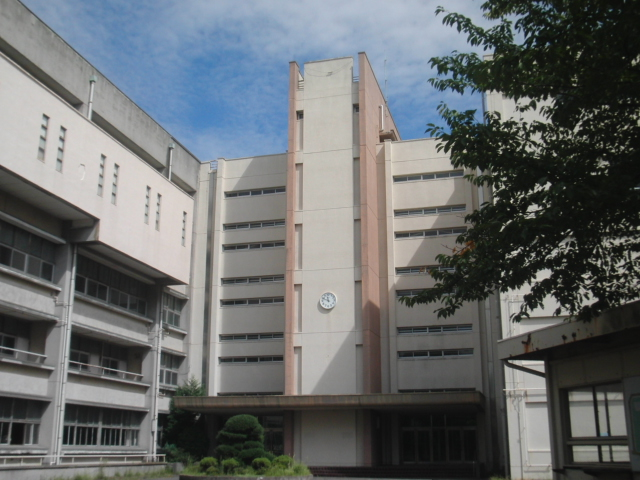 神奈川県立外語短期大学付属高等学校